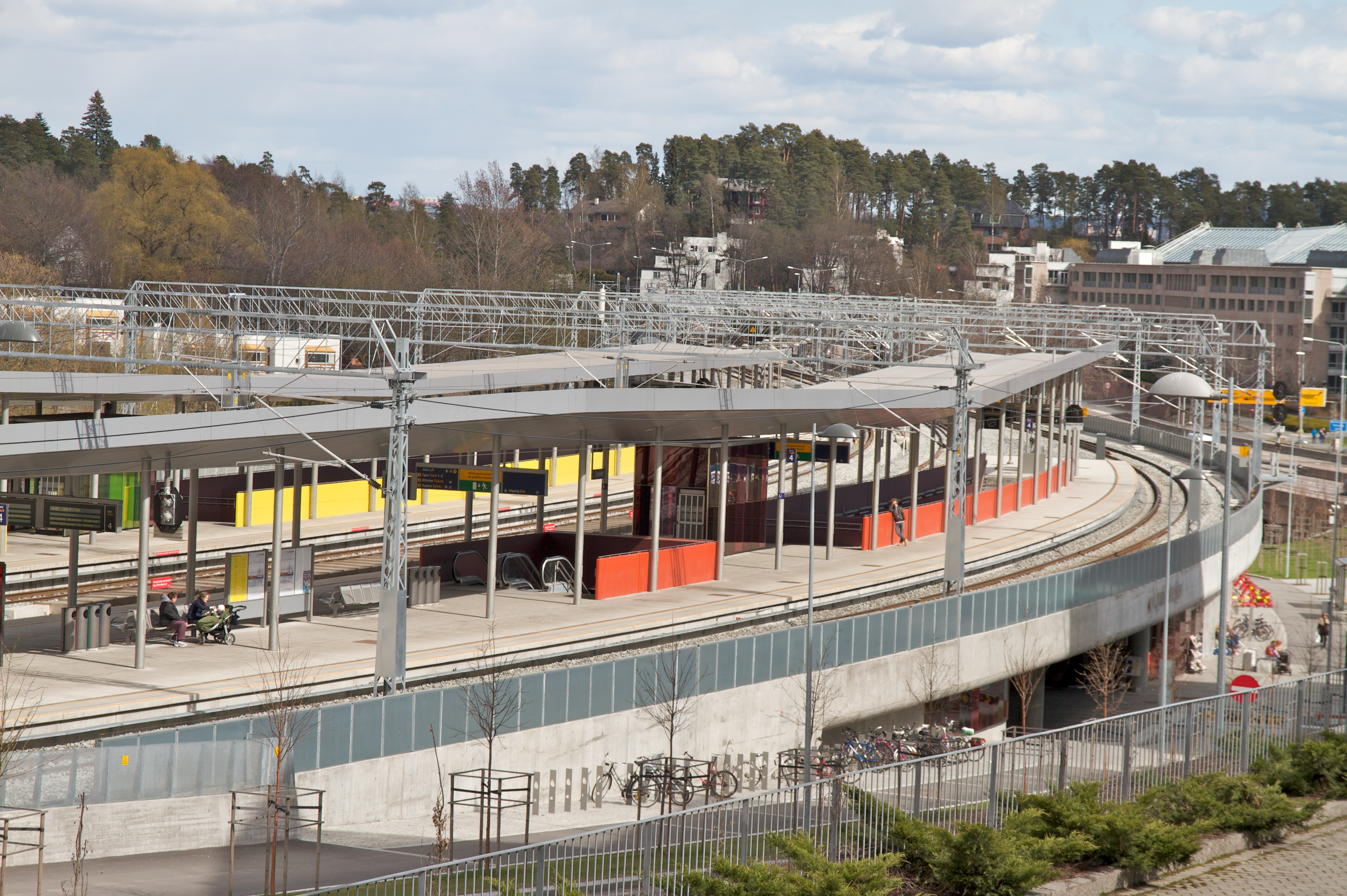 Lysaker stasjon i Bærum.